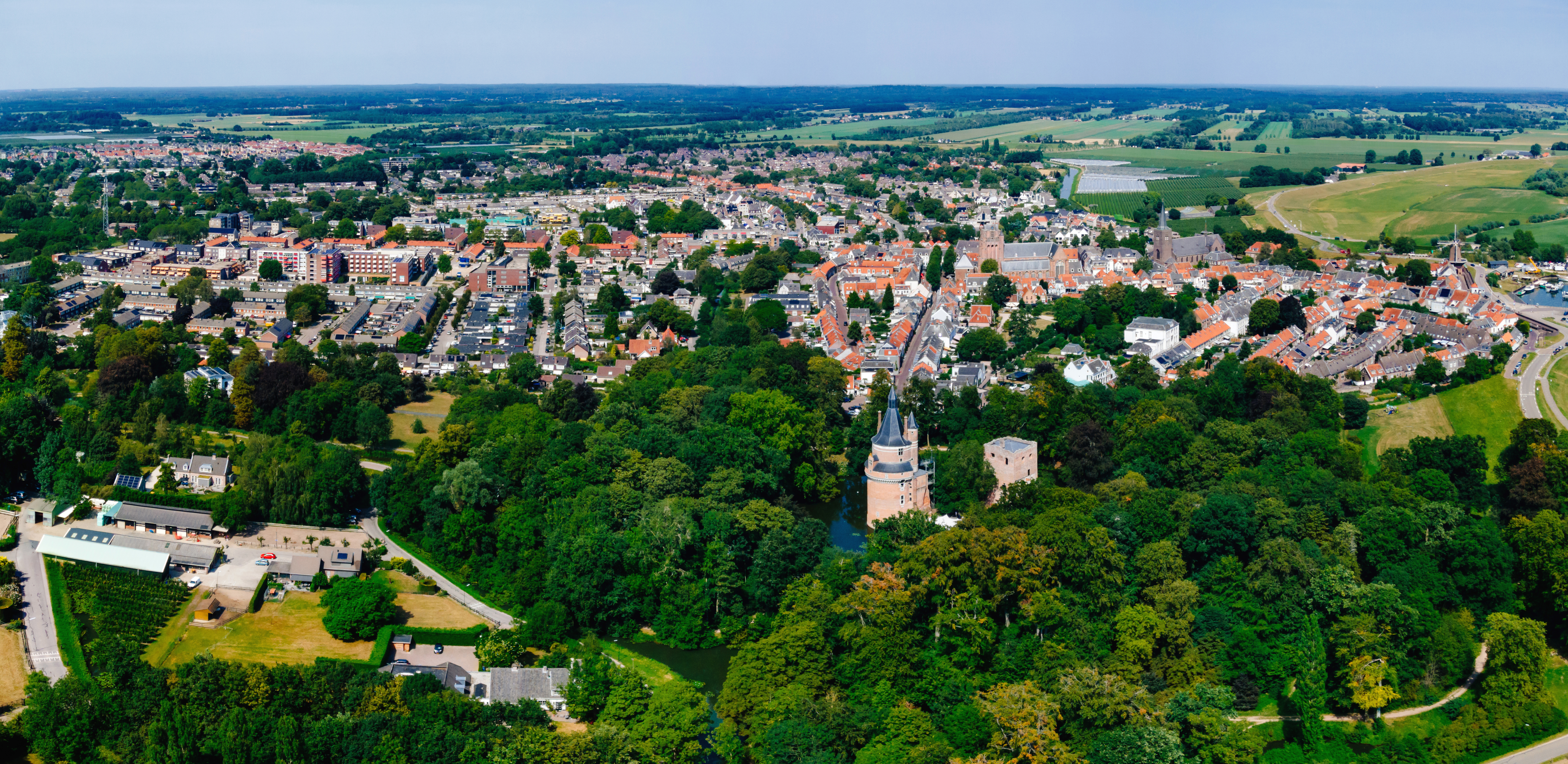 Kasteel Duurstede met in de achtergrond de oude stad.